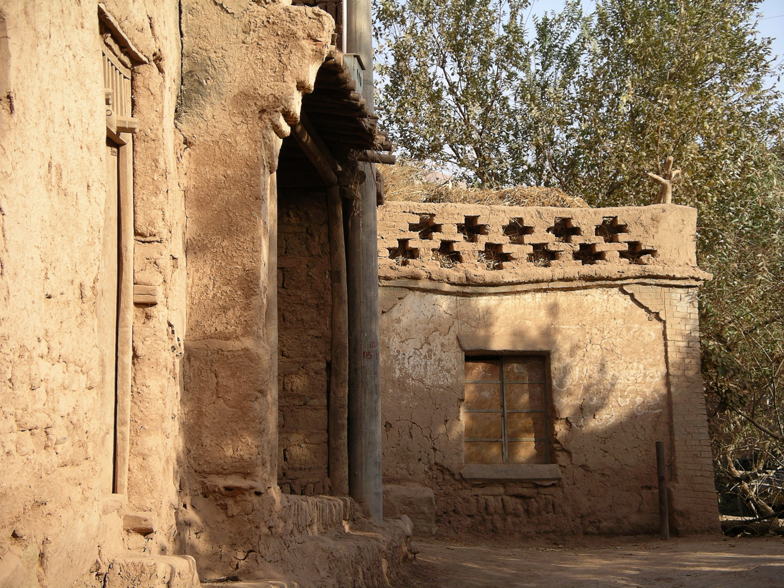 Tuyoq (near Turpan), Xinjiang, China